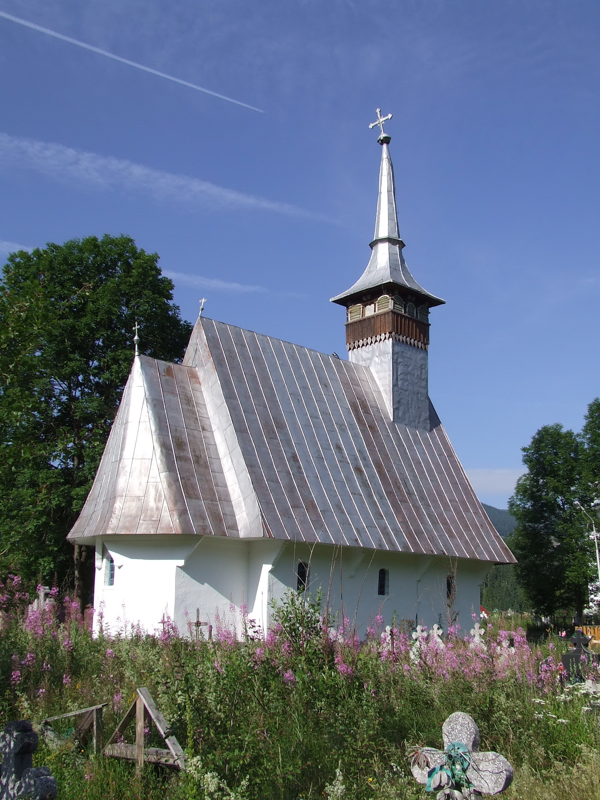 Biserica de lemn din Arieşeni 01